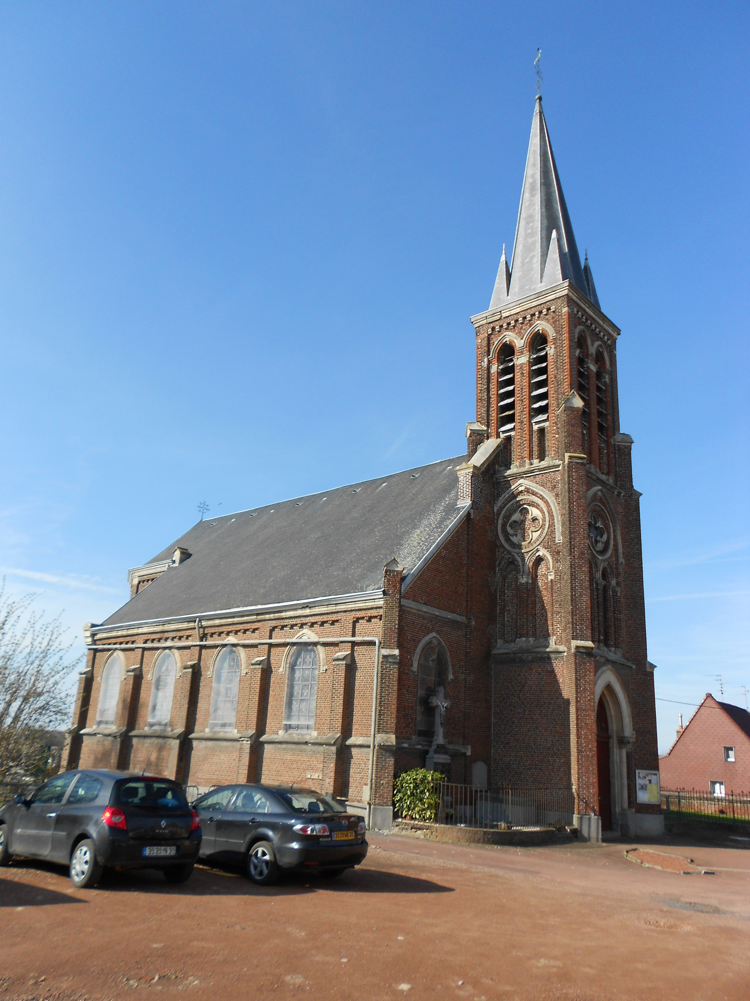 Eglise de Tressin (59, Nord)